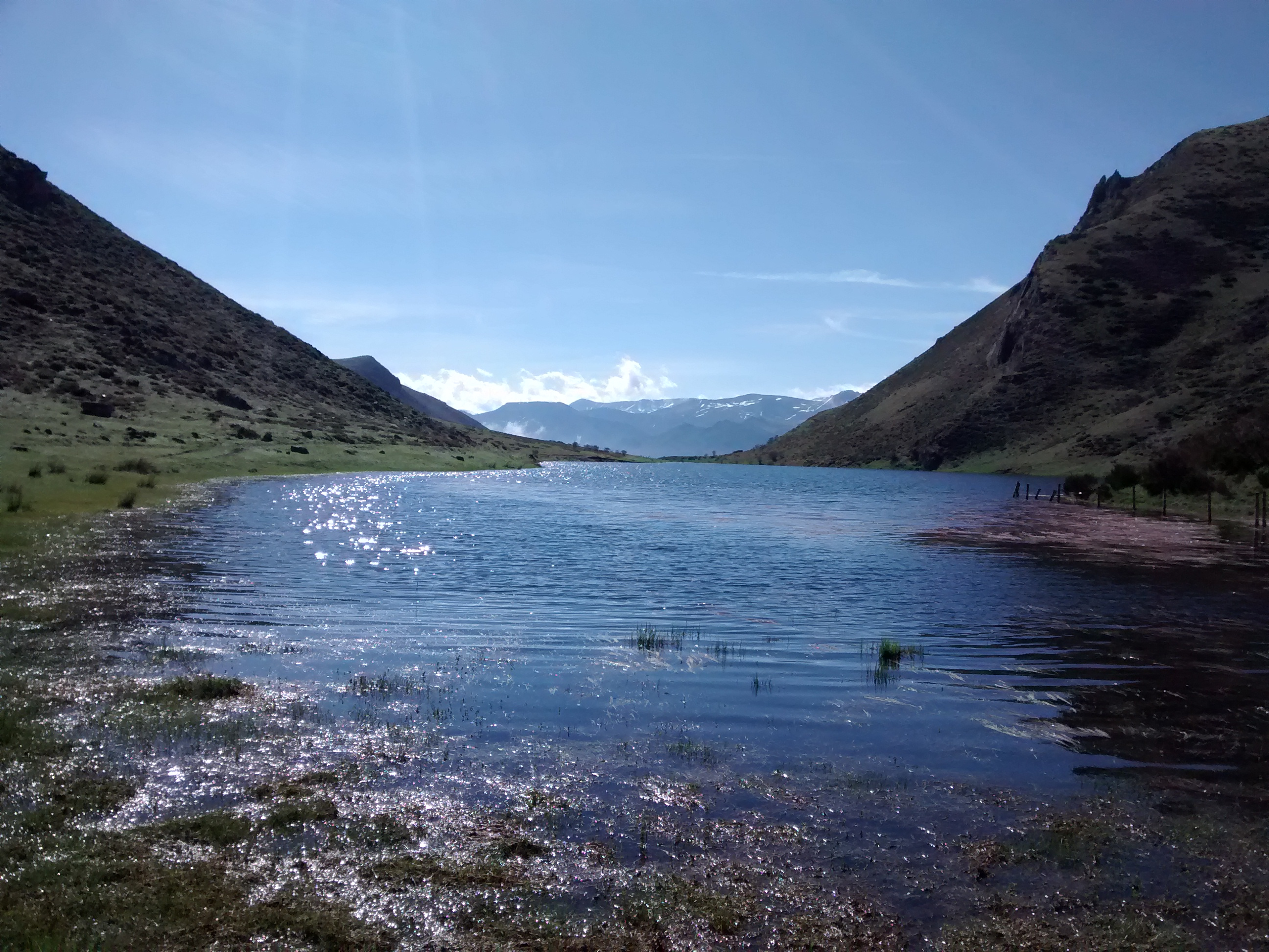 Foto realizada el 23 de abril de 2015